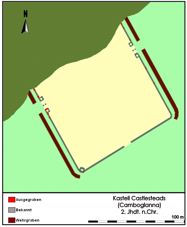 Befundplan des Kastells Castlesteads (Camboglanna) am Hadrianswall, Ausgrabung von 1934.